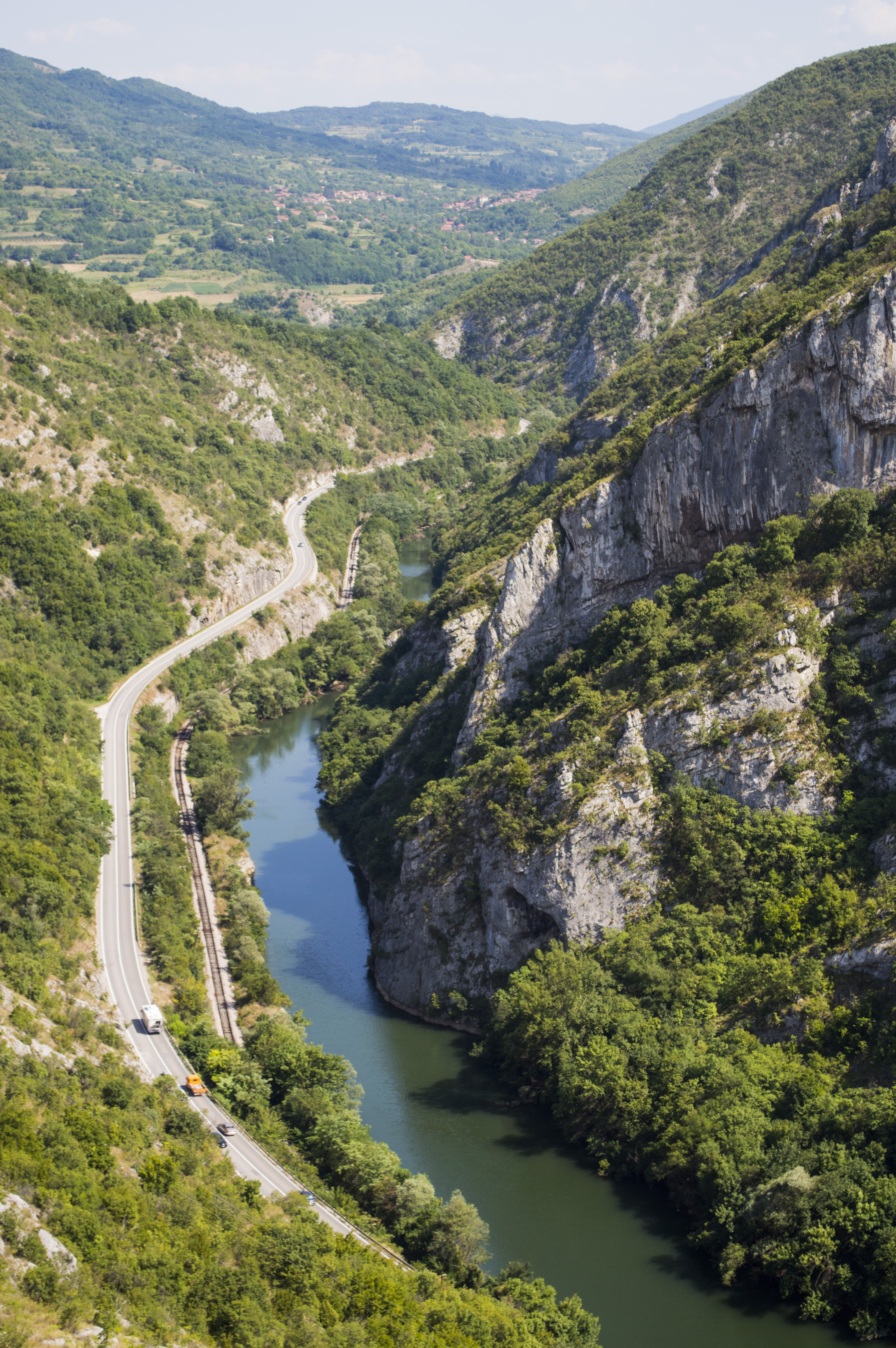 Sićevačka klisura vidikovac